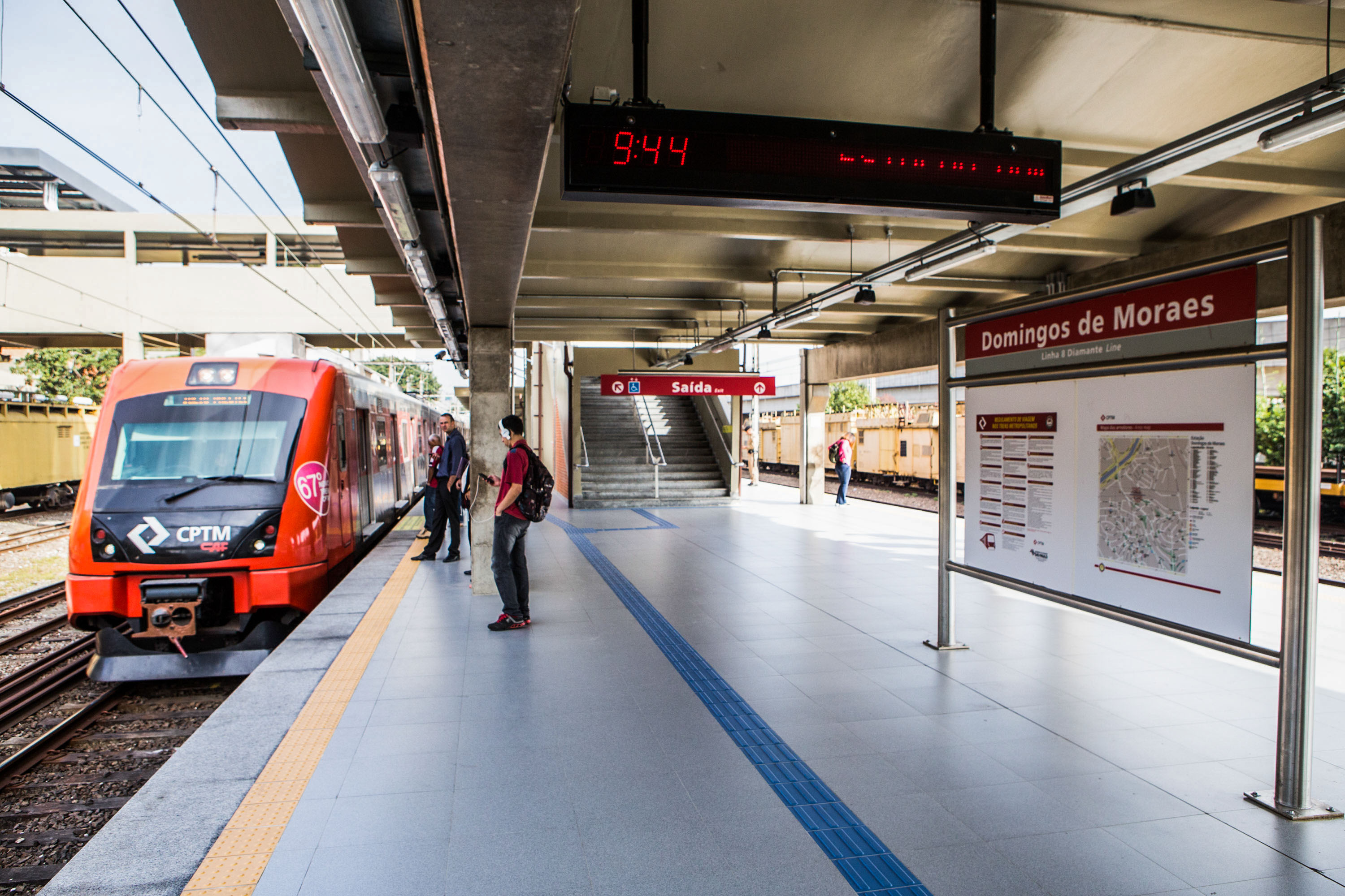 reinauguração em 2014